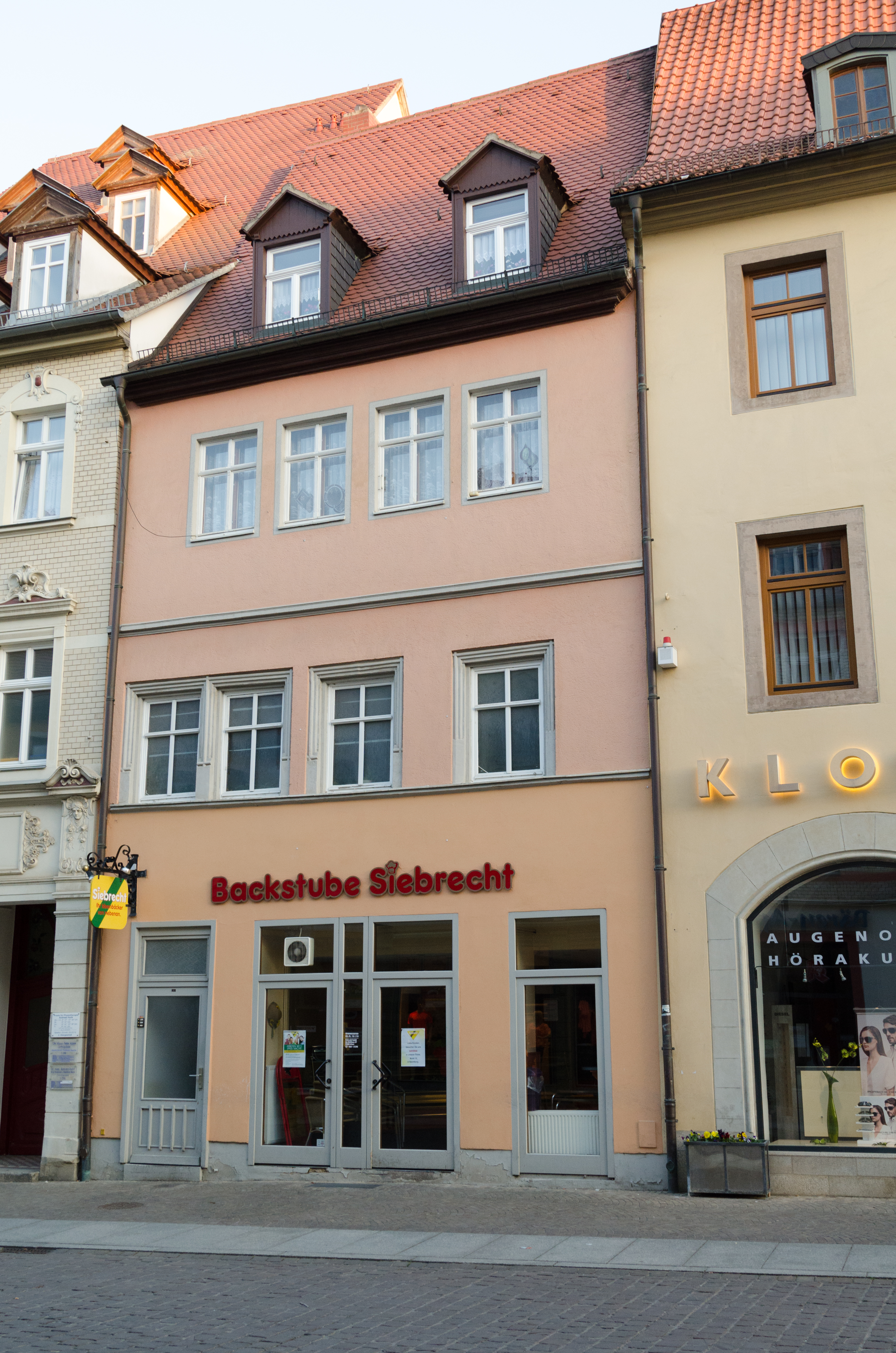 Naumburg, Jakobstraße 4